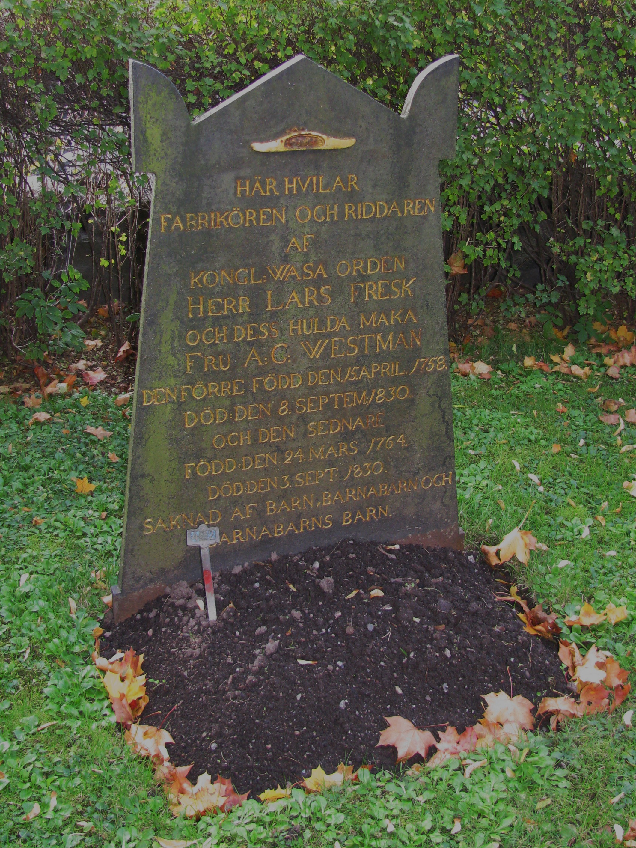 Lars Fresks grav vid Värmdö kyrka. Källa: eget foto, fotograf EnDumEn, 30 september 2009